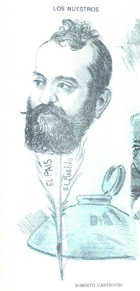 Caricatura.